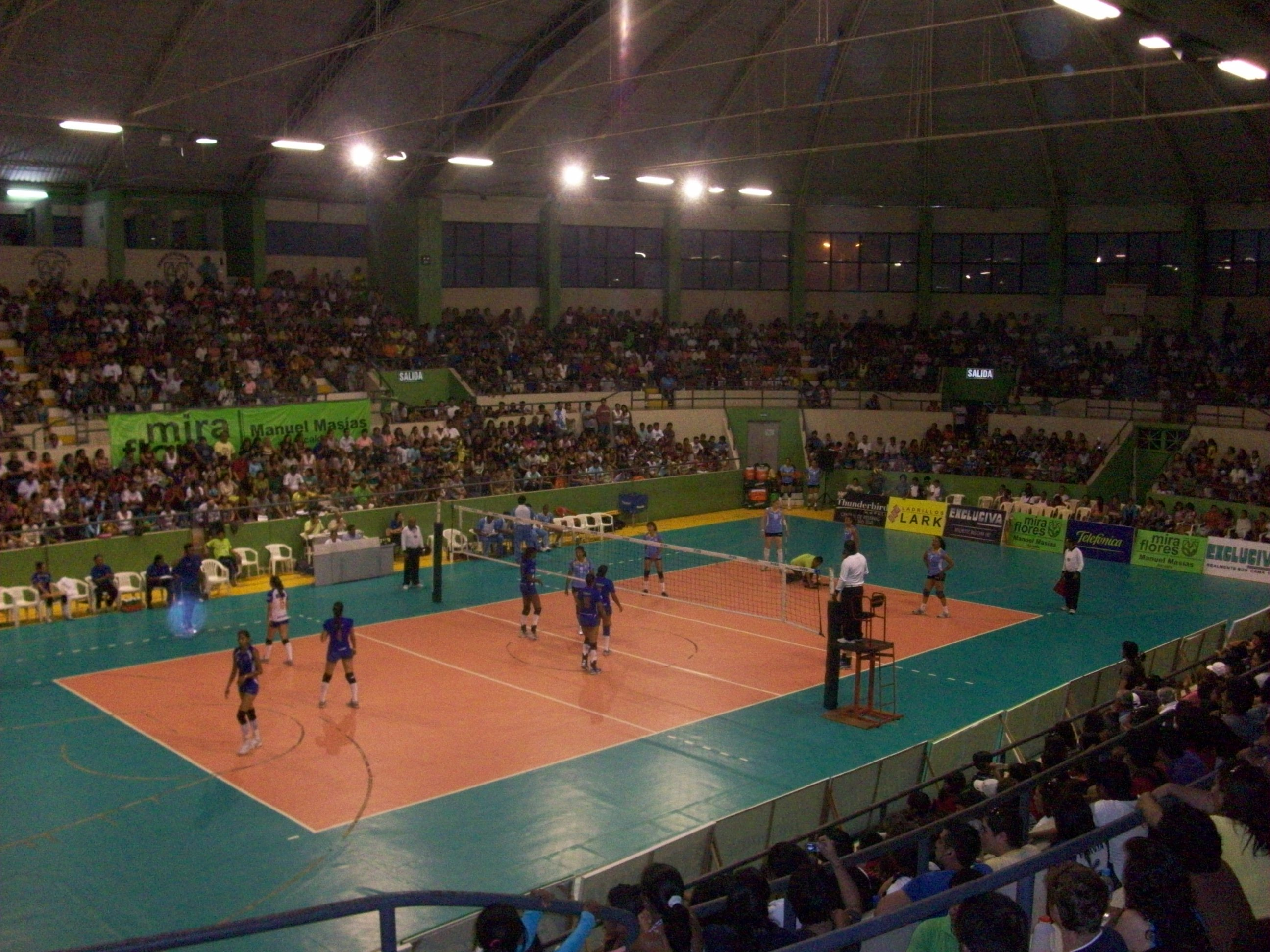 Partido de la Liga Nacional Superior de Voleibol Femenino entre los equipos de Regatas Lima y Deportivo Géminis en la edición 2009/10, realizado en el Coliseo Niño Héroe Manuel Bonilla, Perú.